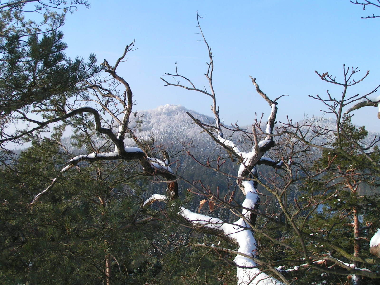 Velký Jelení Vrch, okres Česká Lípa, Czech Republic Jiří Vackář 20:27, 15 May 2006 (UTC)